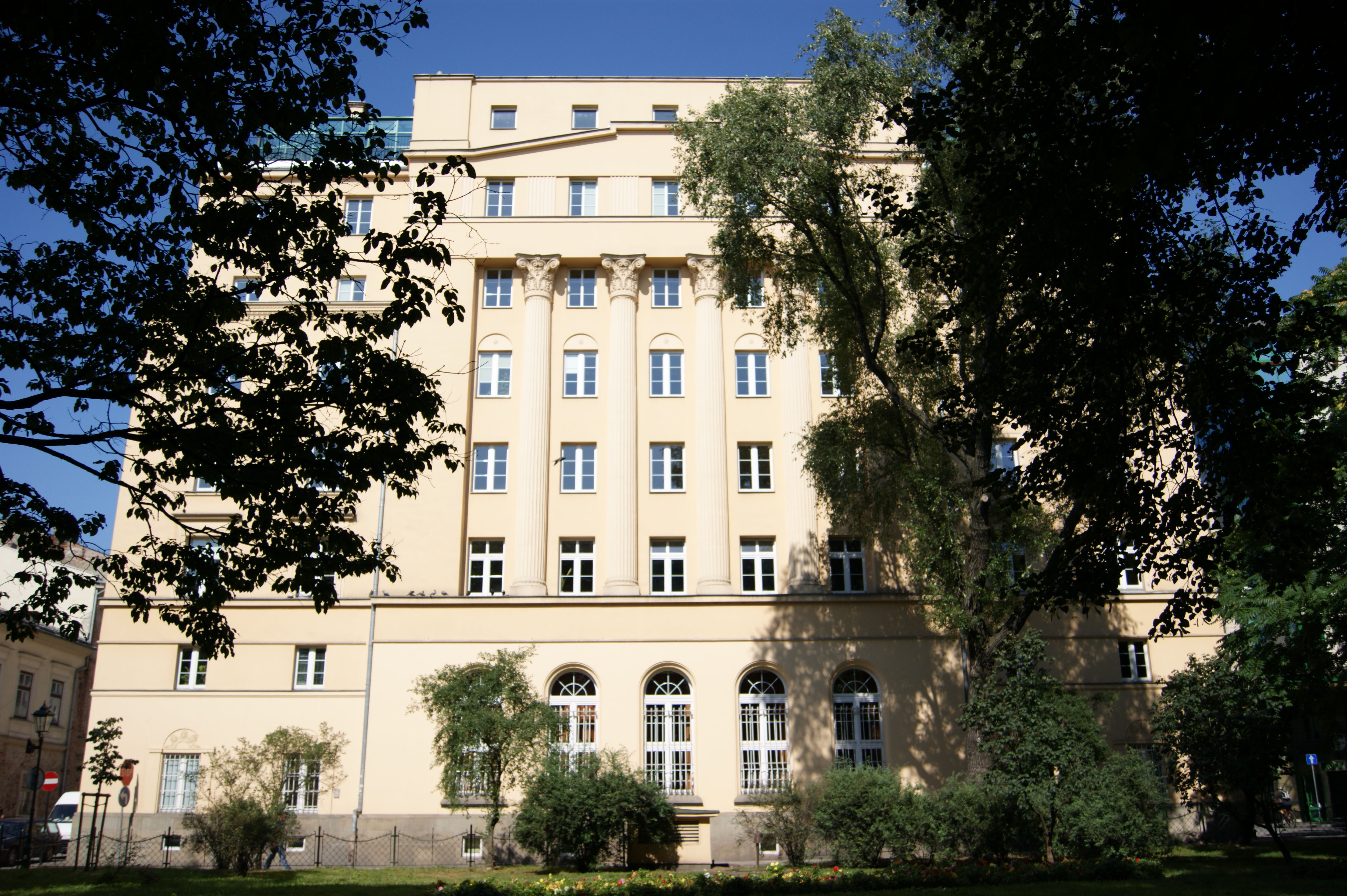 Akademia Muzyczna w Krakowie, od strony Plant/ul.Westerplatte